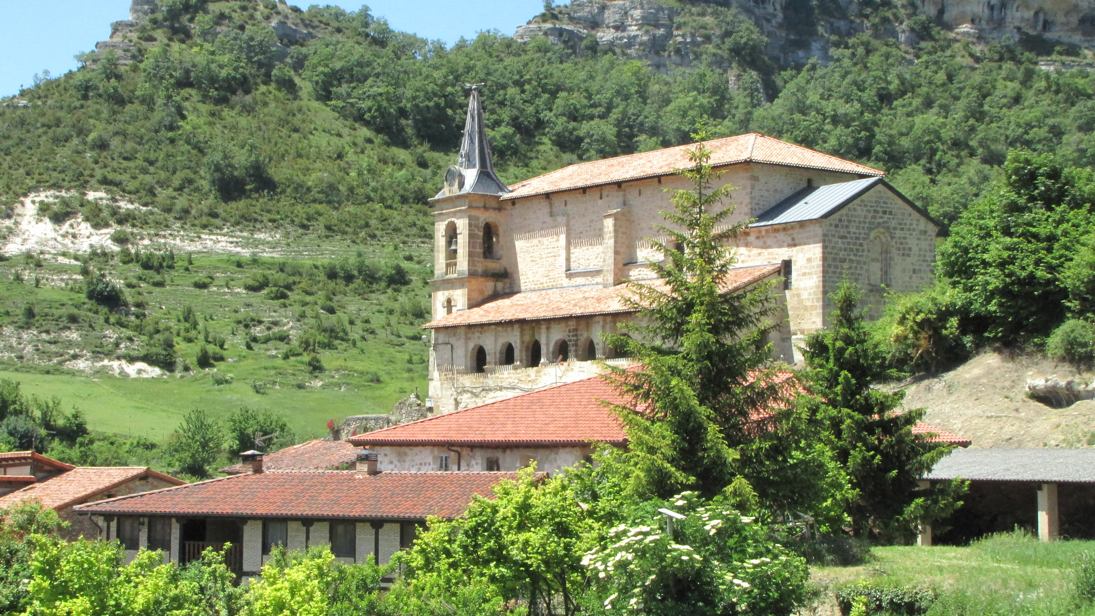 Arluzearen ikuspegia